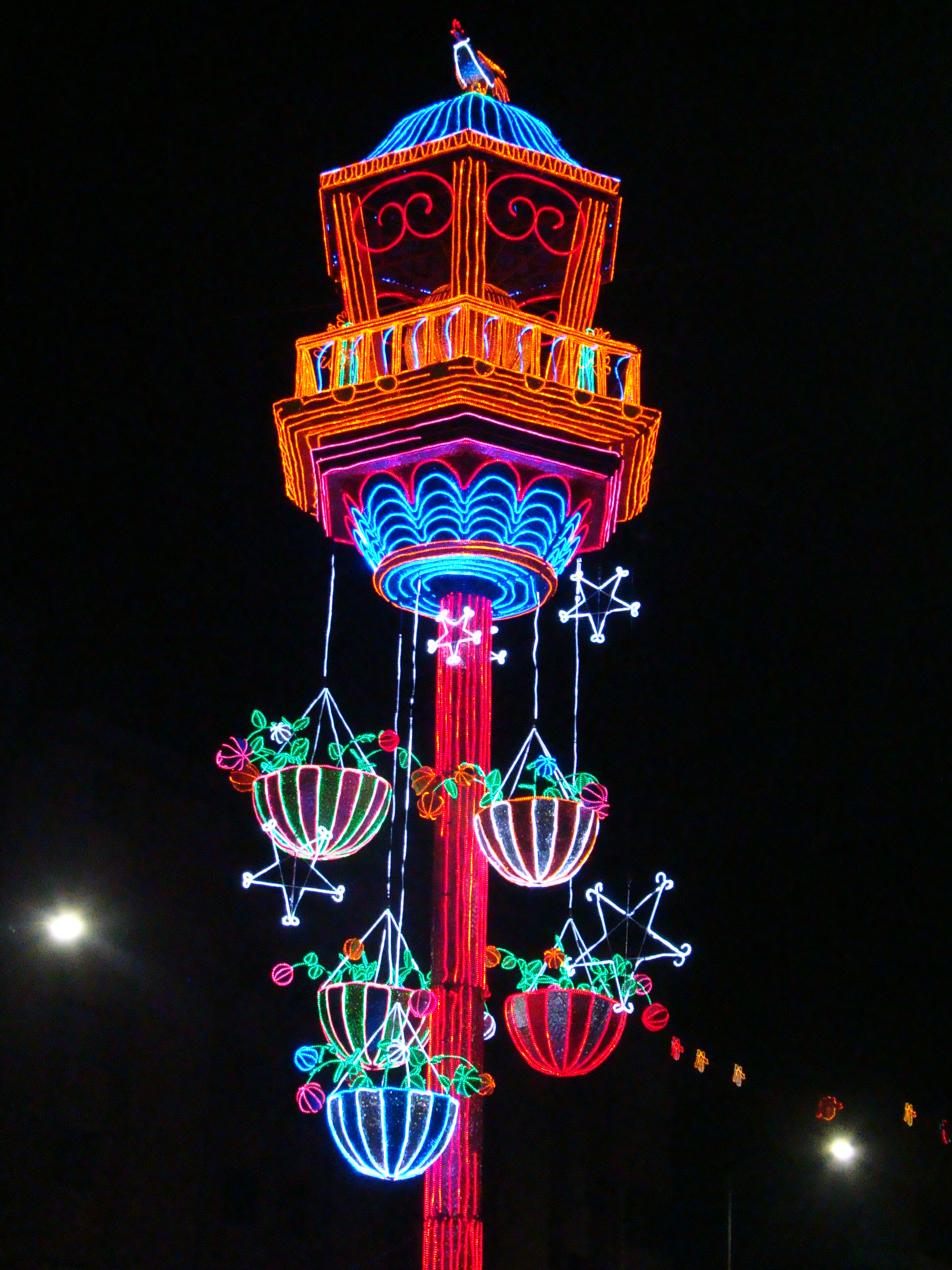 Alumbrado navideño de Medellín de 2011.